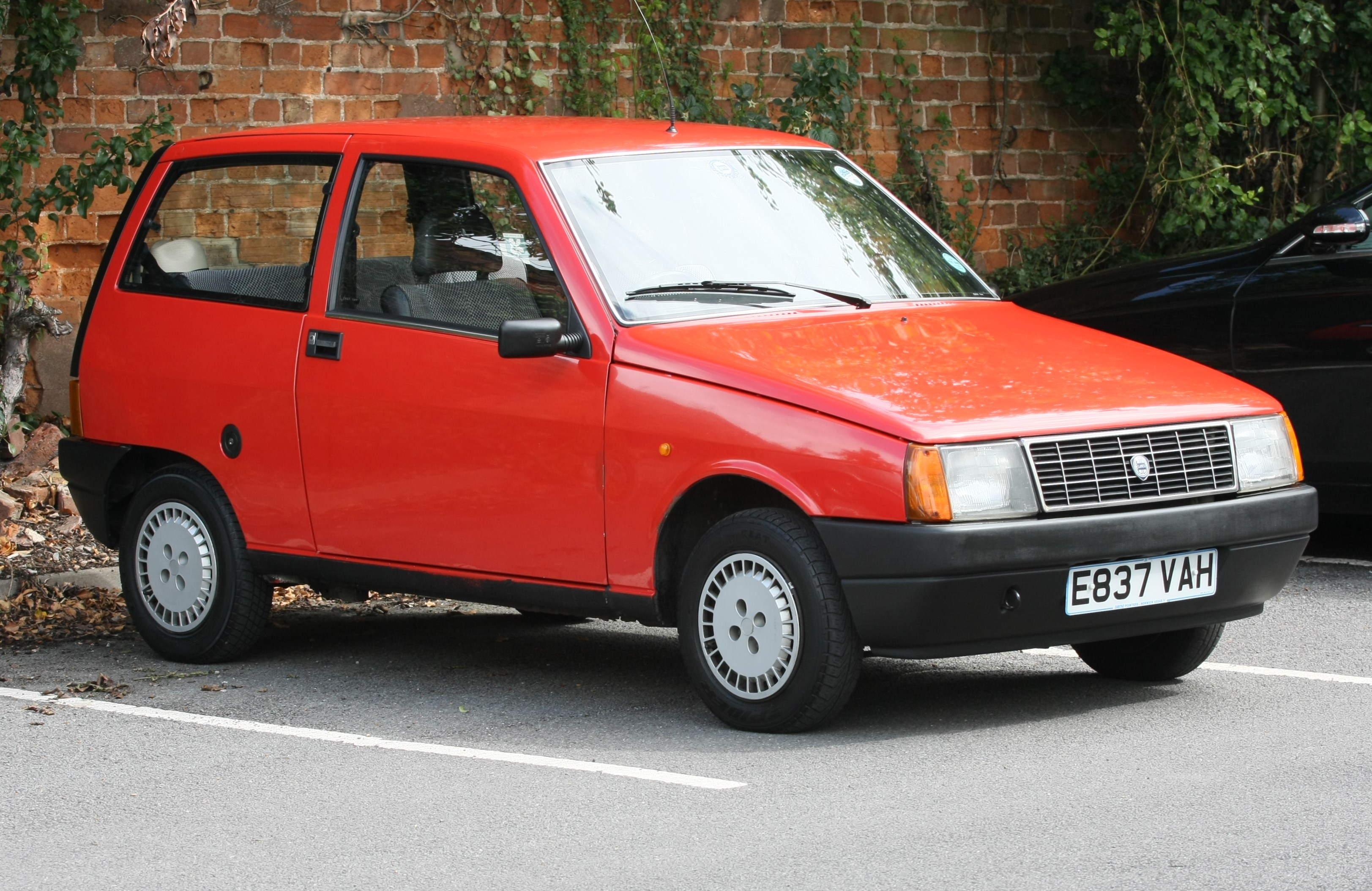 Lancia Motor Club AGM / Giro di Salopia 2009